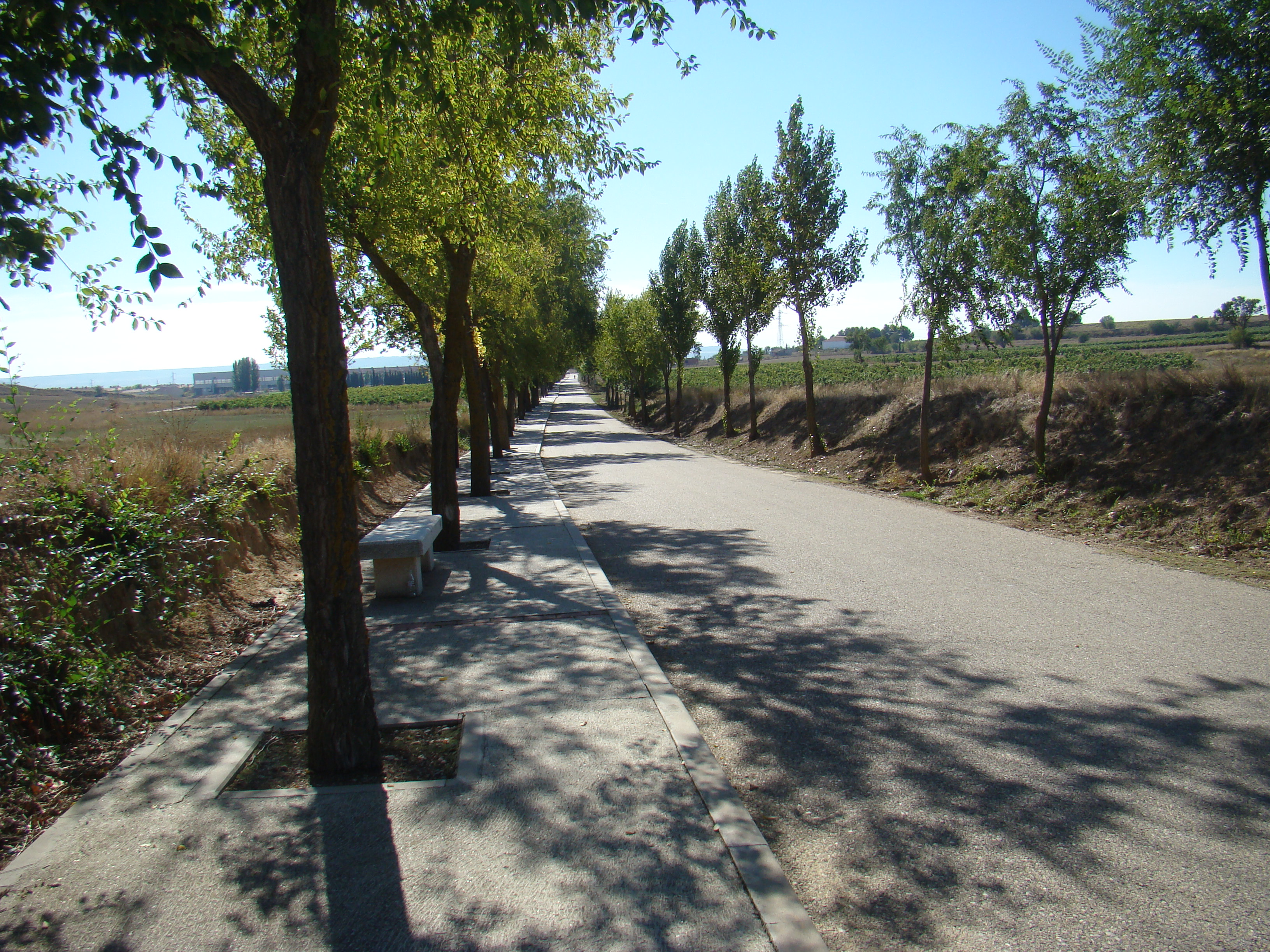 Ermita de Nuestra Señora de Viloria, a un km y medio de Cigales (Valladolid, España). Camino de llegada llamado Camino de los Mártires.